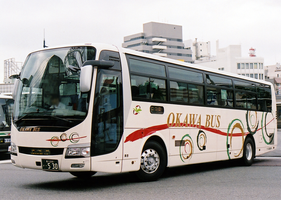 大川自動車 高徳エクスプレス 三菱ふそう・エアロエース ハイウェイライナー QRG-MS96VP